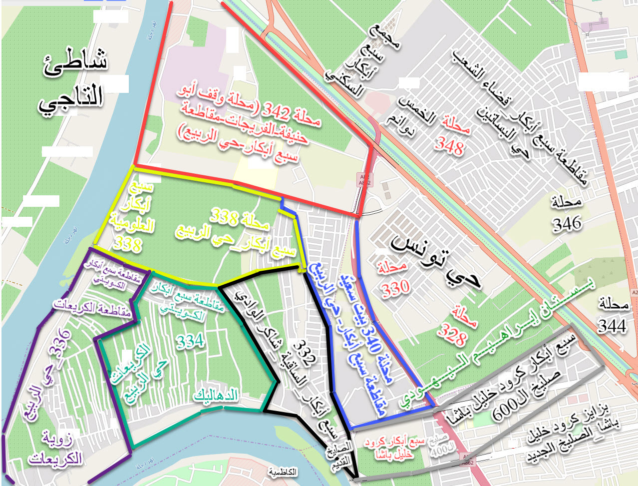 خارطة مقاطعة سبع أبكار وحي الربيع وأسماء وأرقام محلاتها